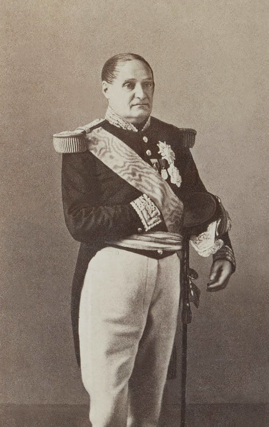 Jérôme Bonaparte (1784-1860)